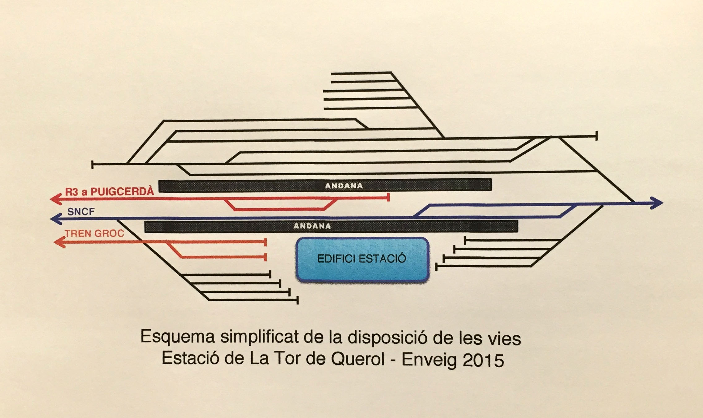 Esquema de disposició de vies a l'estació la Tor de Querol